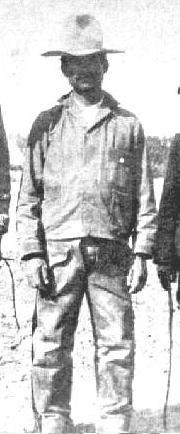 El Capitan Alvarez en 1914